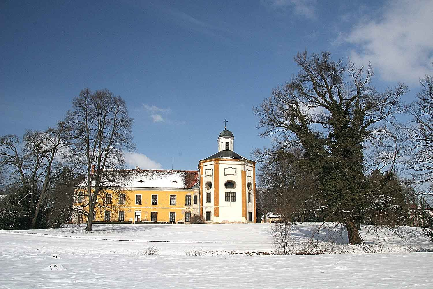 Česky: Zámek Choltice s kaplí svatého Romedia, okres Pardubice. Česky: Chateau in Choltice, Pardubice District, Pardubice Region, the Czech Republic